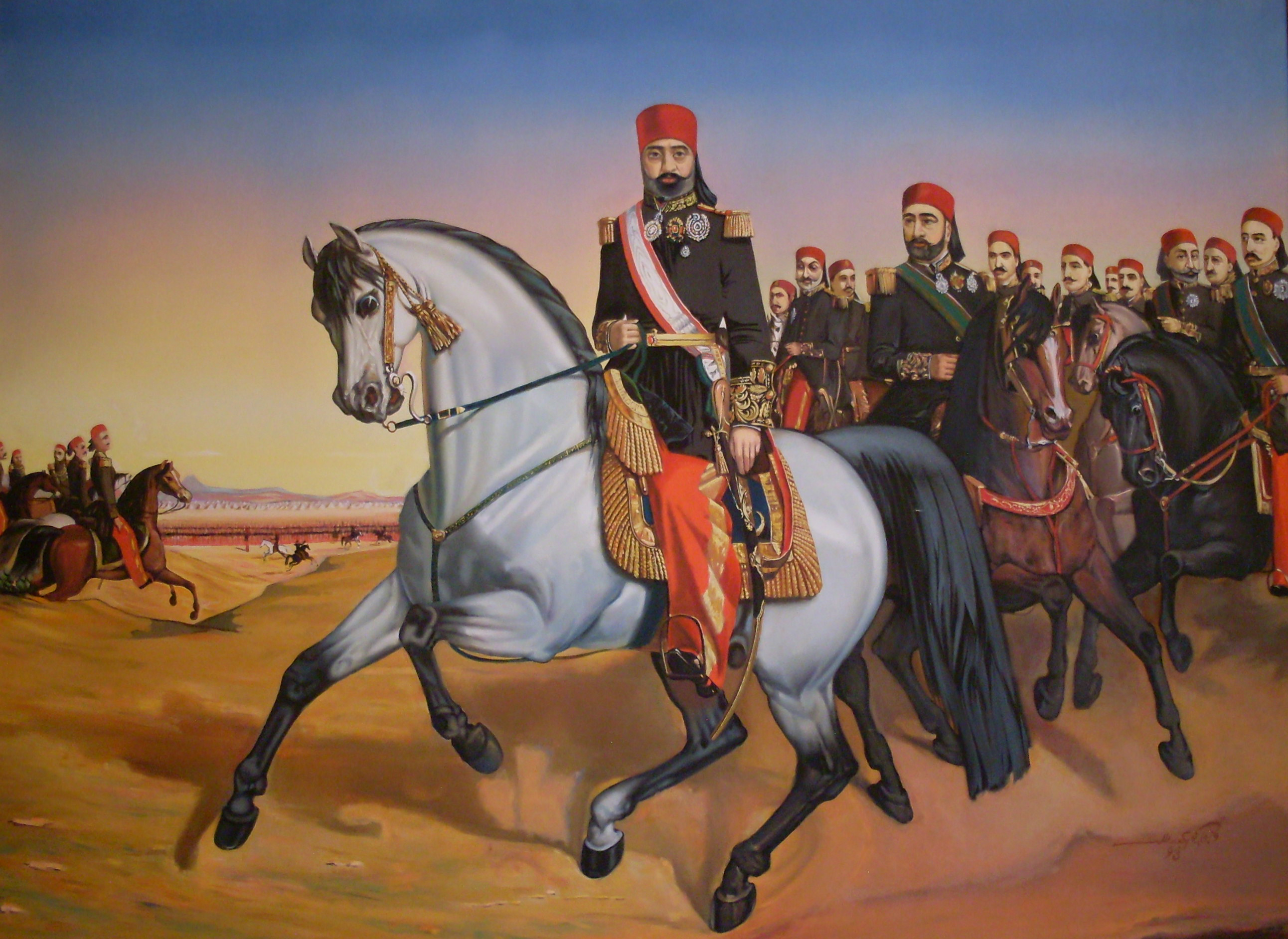 Visite de Sadok Bey et de son état-major à la m'halla dans le Sahel Tableau illustrant la visite de Sadok Bey (montant un cheval blanc) et de son état-major à la m'halla dans le Sahel au début de la révolte de 1864 Huile sur toile, 141 x 160,5 cm Tunis, Institut national du patrimoine, collection Qsar es-Saïd, inv. 46-07-28-85